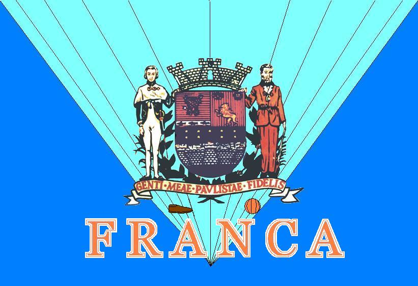 Nova bandeira do município de Franca (São Paulo), adotada desde 1/11/2007 Emerson